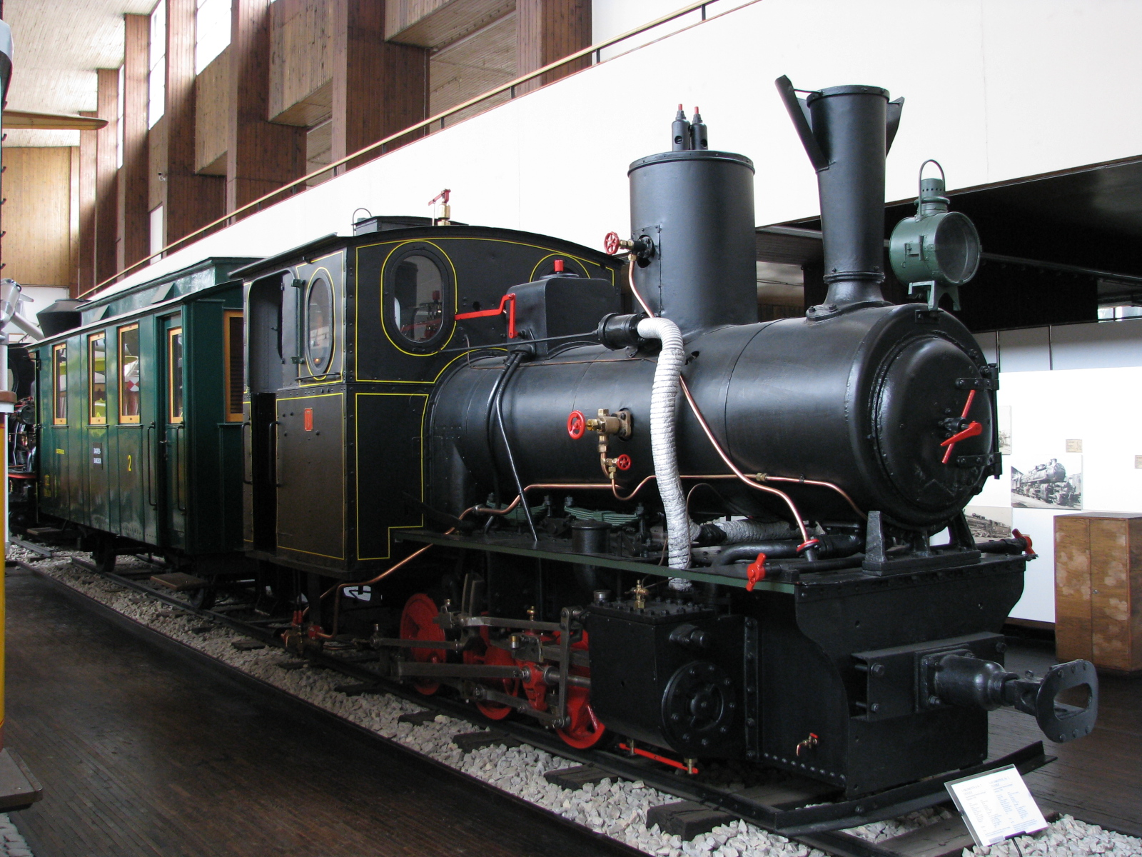 Parna lokomotiva br. 7, tender i željeznička kola AD-14 u službi Gradske željeznice Zagreb - Samobor (Samoborček). Tehnički muzej Zagreb